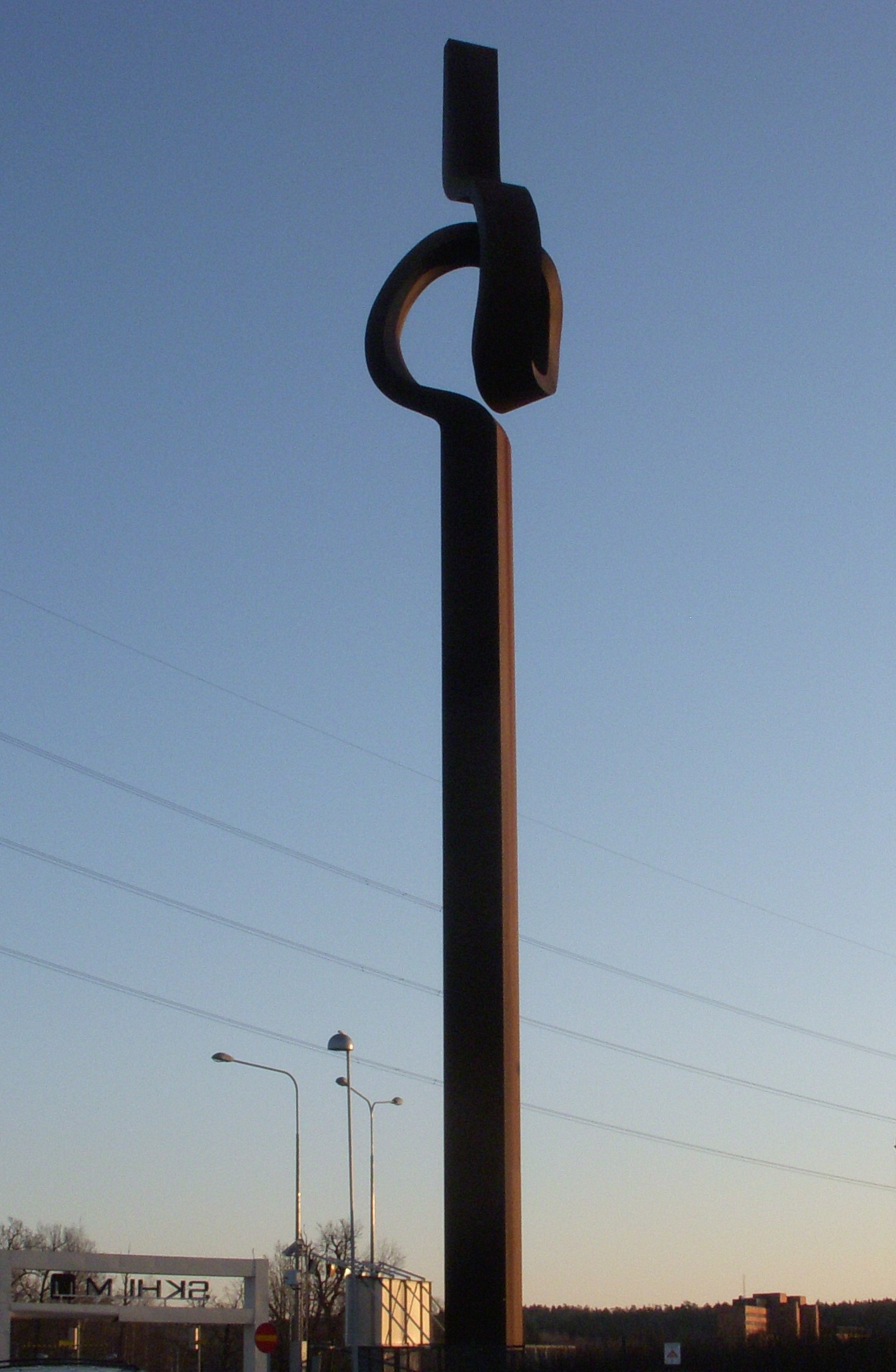 "Vridande moment" i Skärholmens centrum skapades 1968 av konstnären Aston Forsberg.